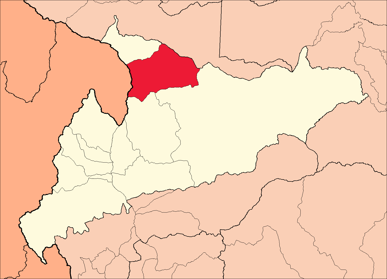 Área del distrito de Jircán dentro de la provincia de Huamalíes.